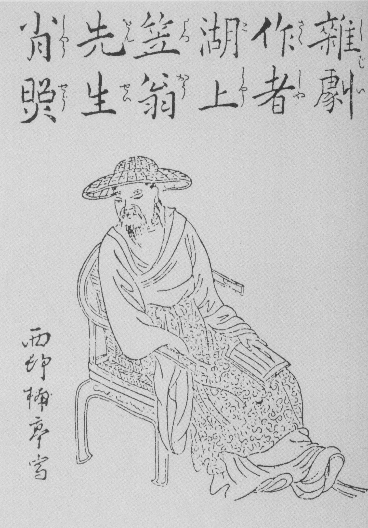 《唐土奇談》中李漁的畫像。